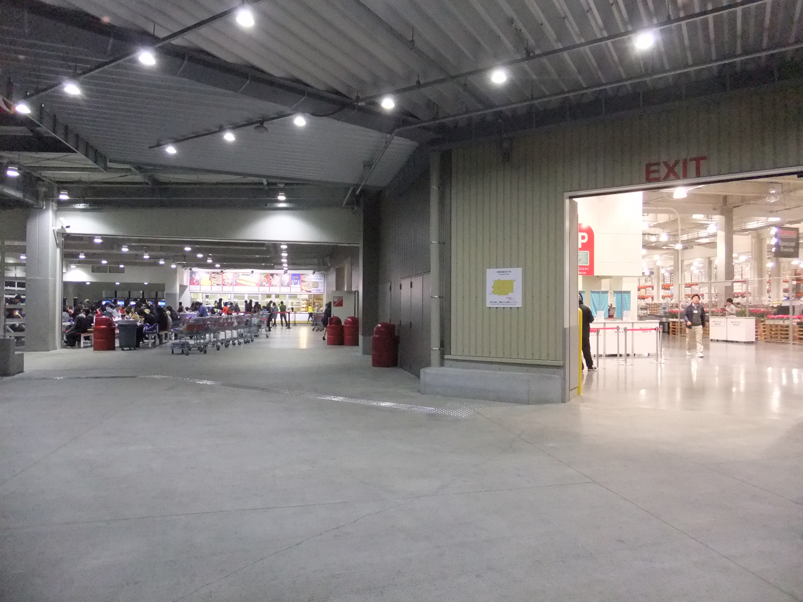 コストコ広島倉庫店